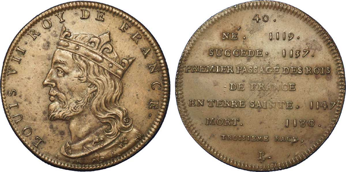 Série métallique des rois de France: portrait imaginaire de Louis VII